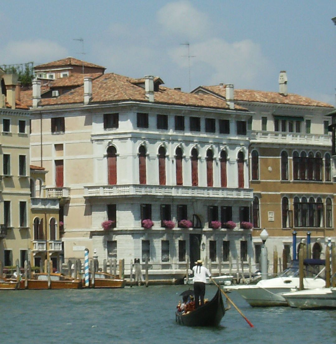 Venise-Palazzo Civran Grimani